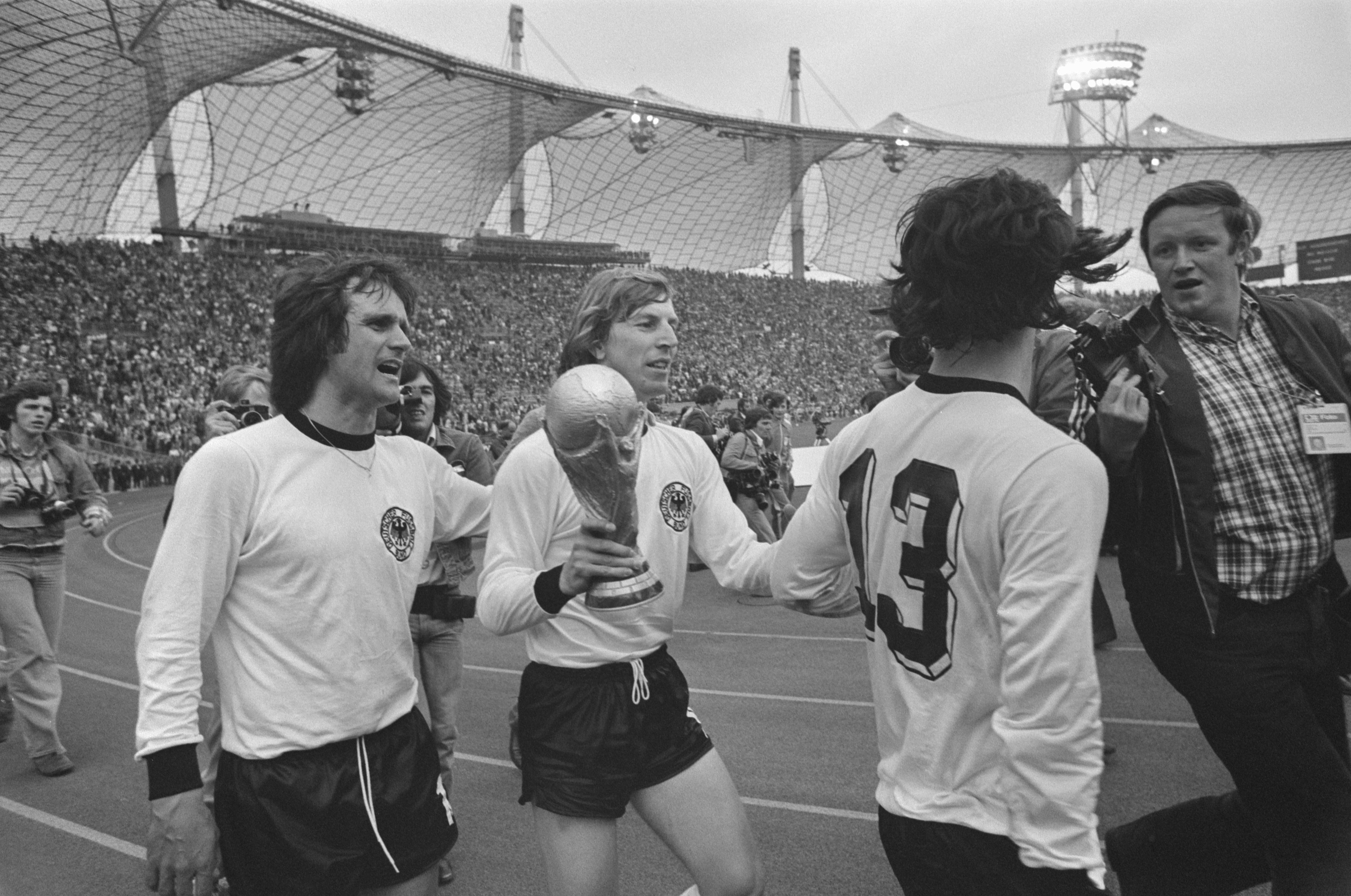 Collectie / Archief : Fotocollectie Anefo Reportage / Serie : [ onbekend ] Beschrijving : Finale wereldkampioenschap voetbal 1974 in Munchen, West Duitsland tegen Nederland 2-1; Duitse spelers met de wereldbeker Datum : 7 juli 1974 Locatie : München, Nederland, West-Duitsland Trefwoorden : finales, sport, voetbal, wereldkampioenschappen Fotograaf : Verhoeff, Bert / Anefo Auteursrechthebbende : Nationaal Archief Materiaalsoort : Negatief (zwart/wit) Nummer archiefinventaris : bekijk toegang 2.24.01.05 Bestanddeelnummer : 927-3104